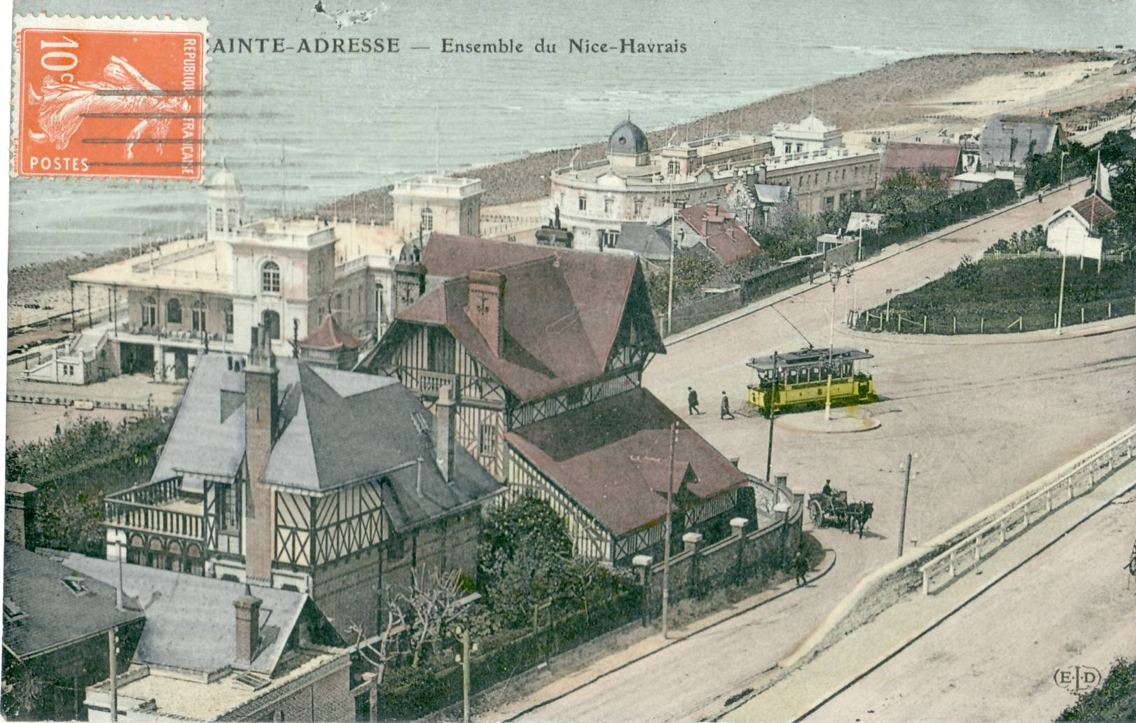 Carte postale ancienne éditée par ELD SAINTE-ADRESSE : Ensemble du Nice HavraisAu second plan, une motrice du Tramway du Havre